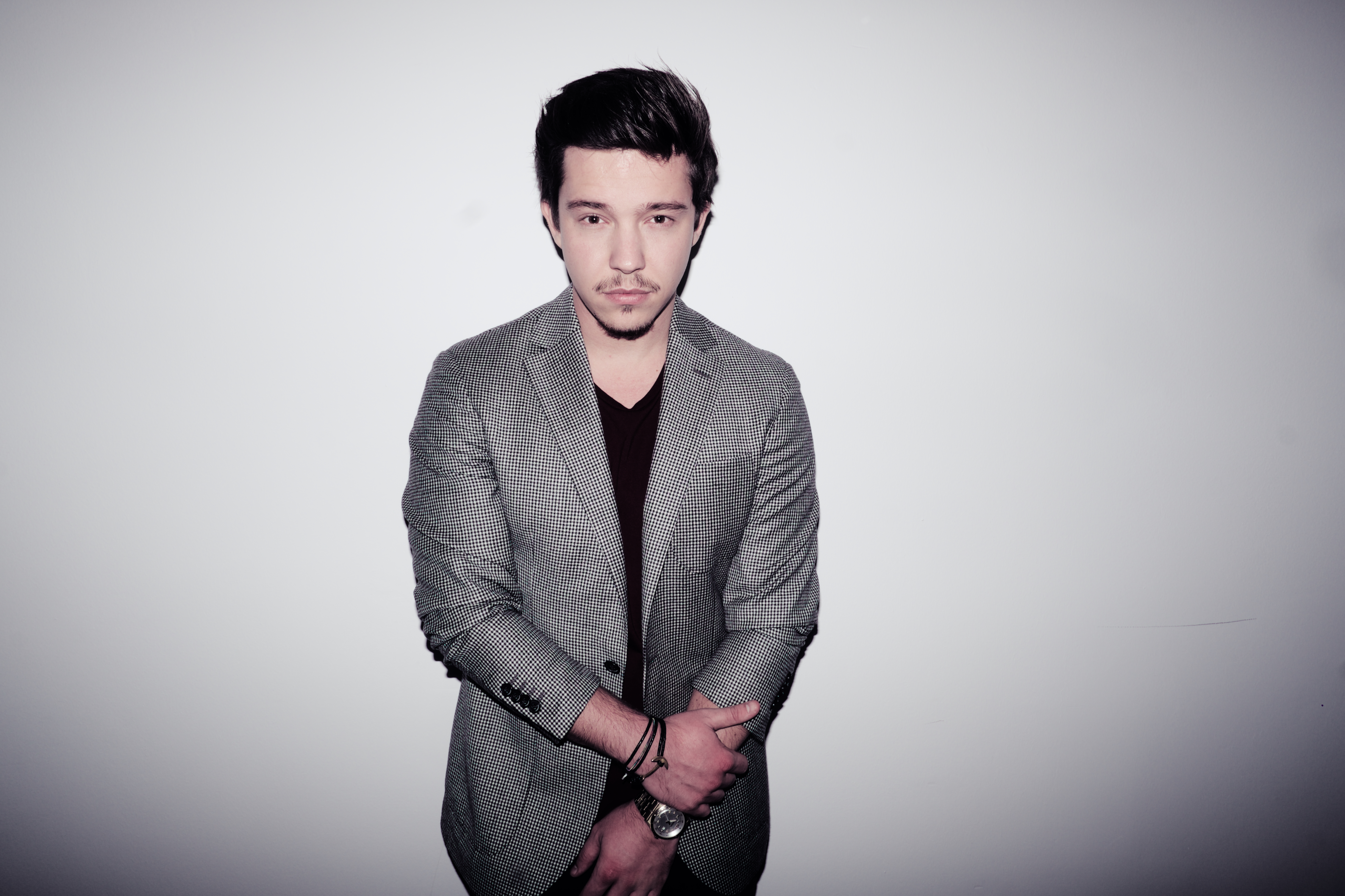 Nico Santos beim Fotoshooting